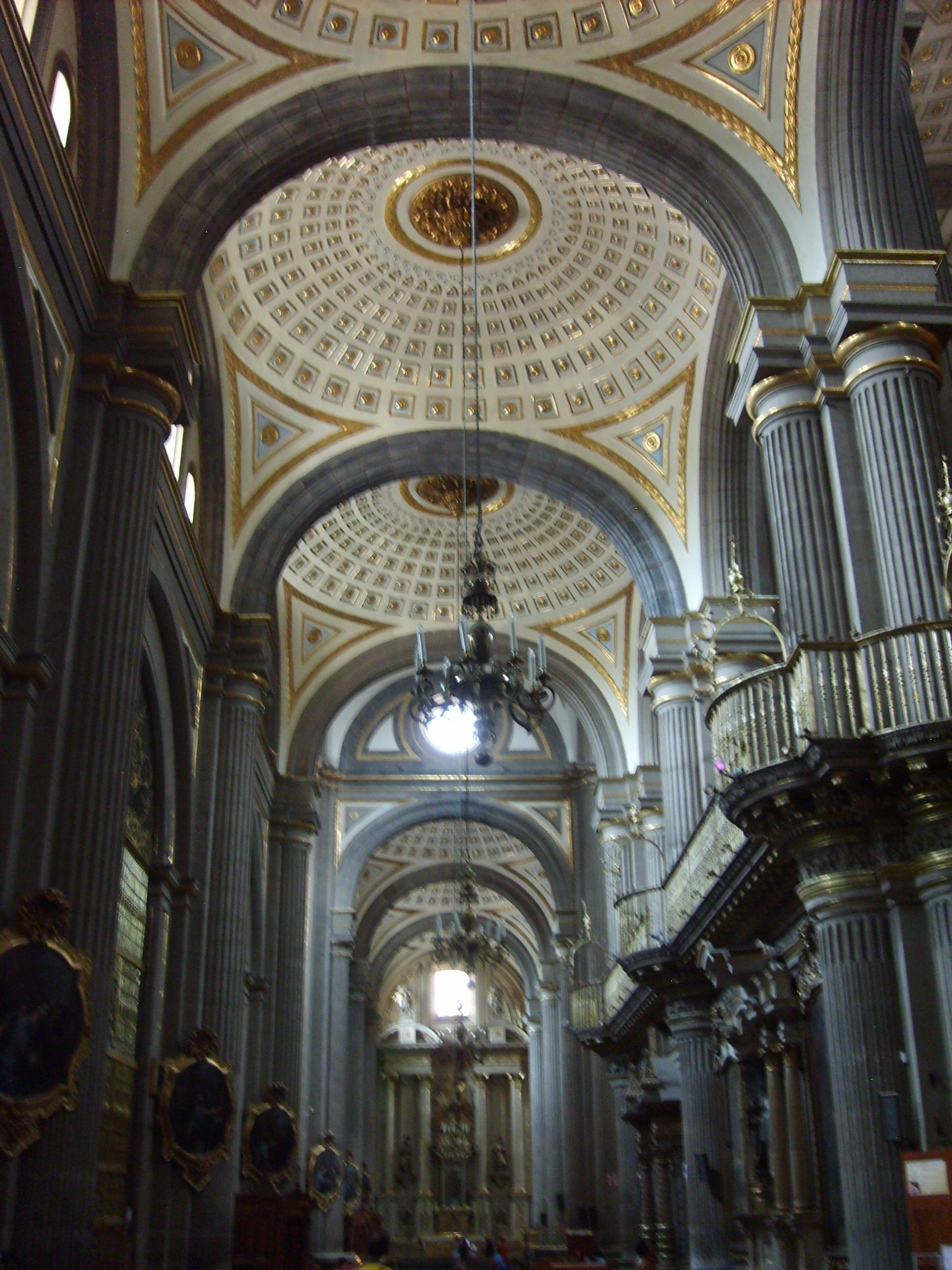 Catedral de Puebla, nave procesional del evangelio desde el lado poniente.